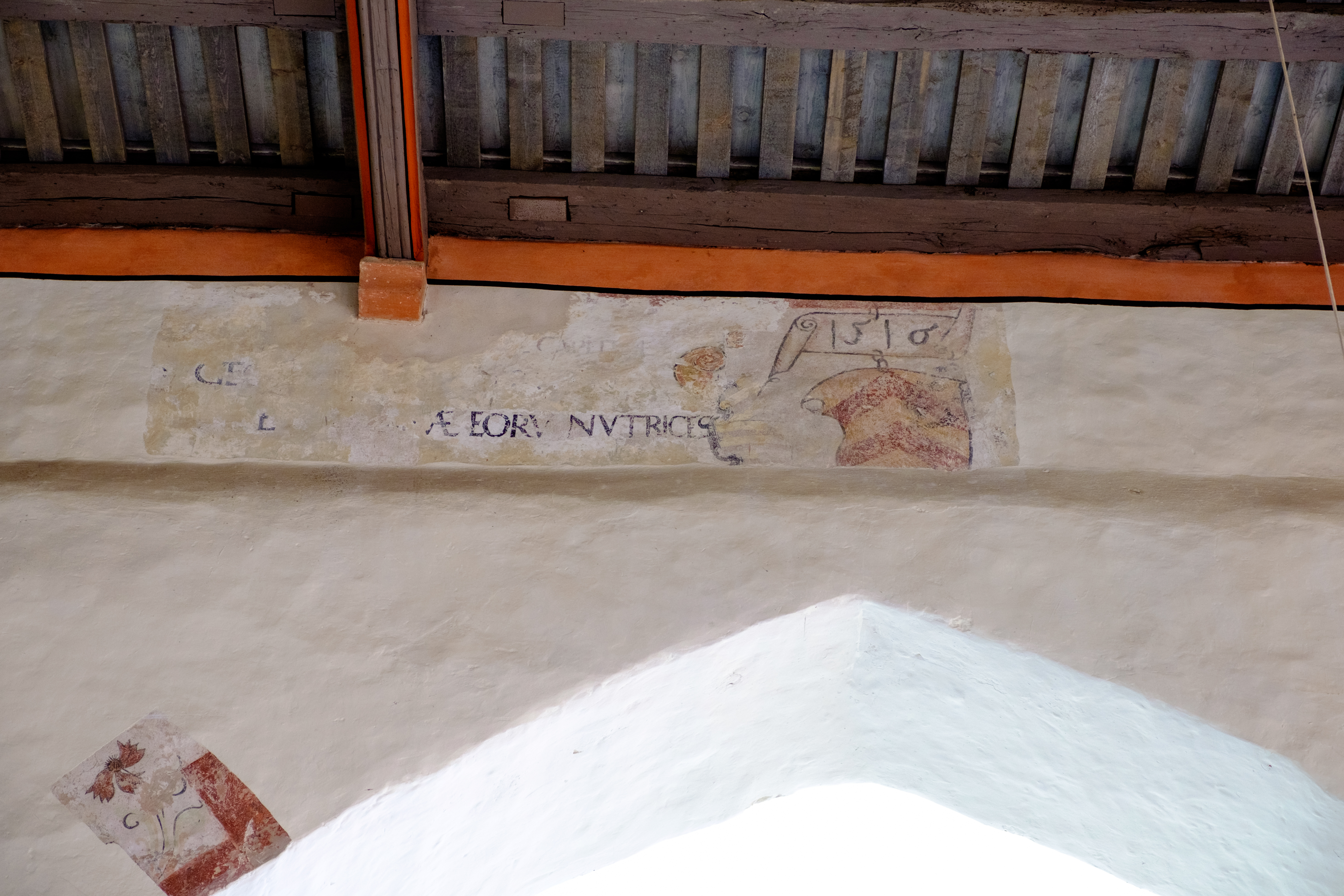 Spätmittelalterliche Wandmalereien in der Katharinankirche in Steinau